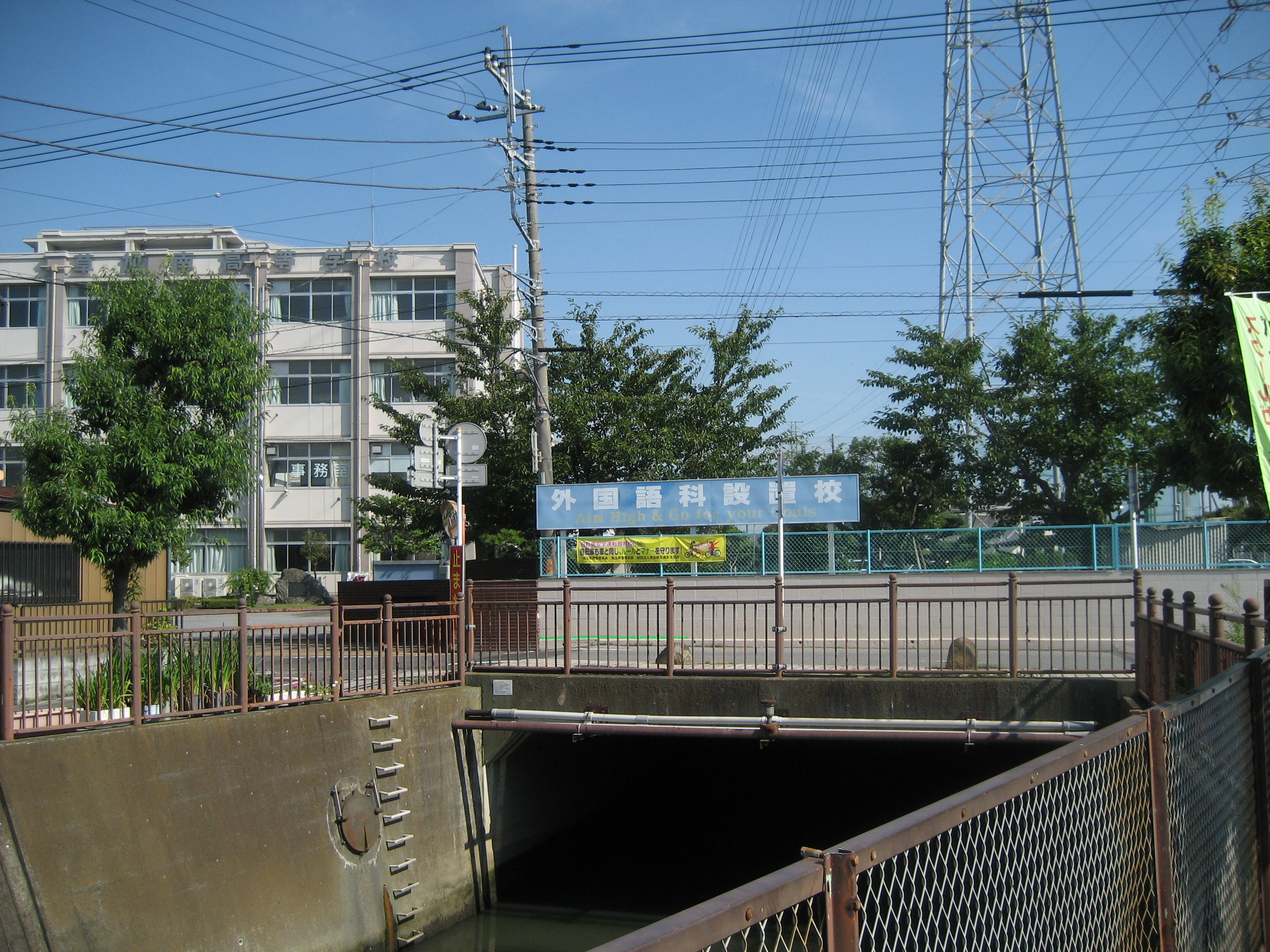 埼玉県立草加南高等学校校舎と敷地下を流れる辰井川